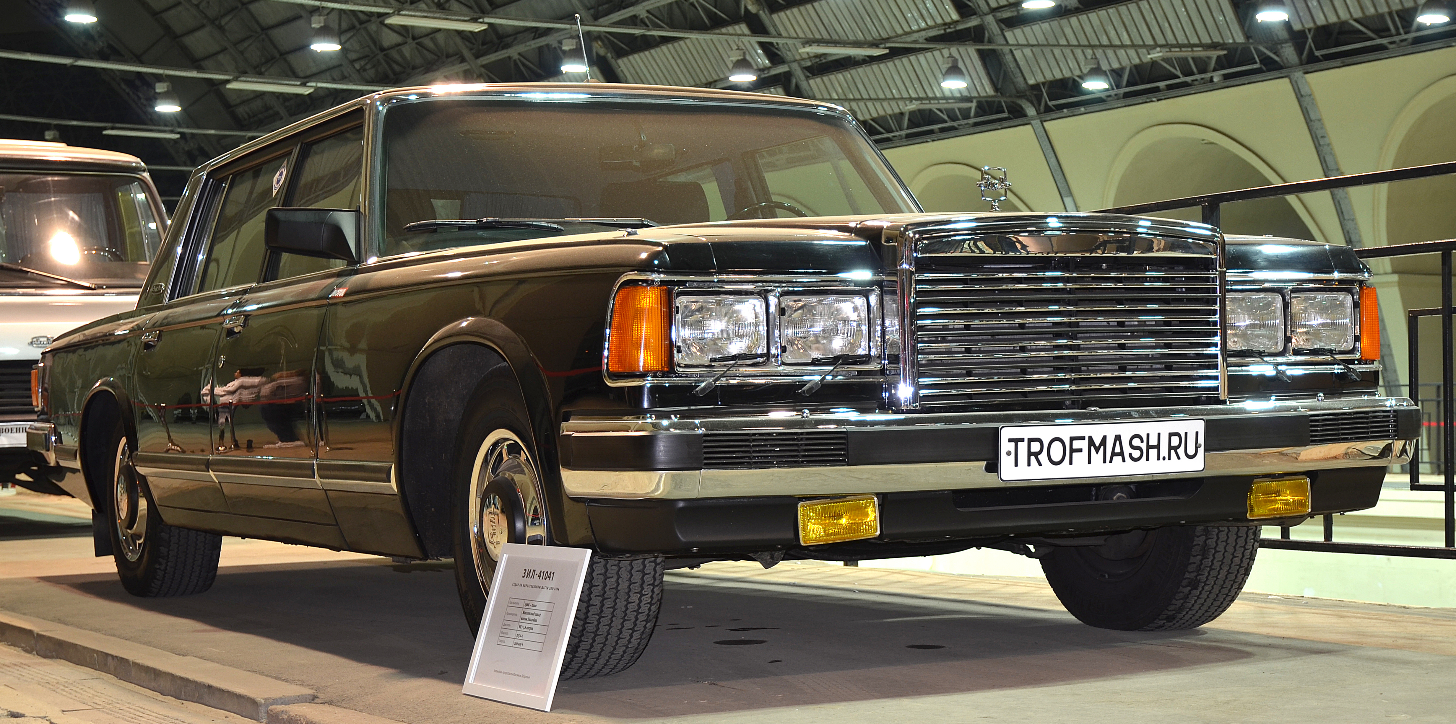 Можно увидеть здесь : You can see here